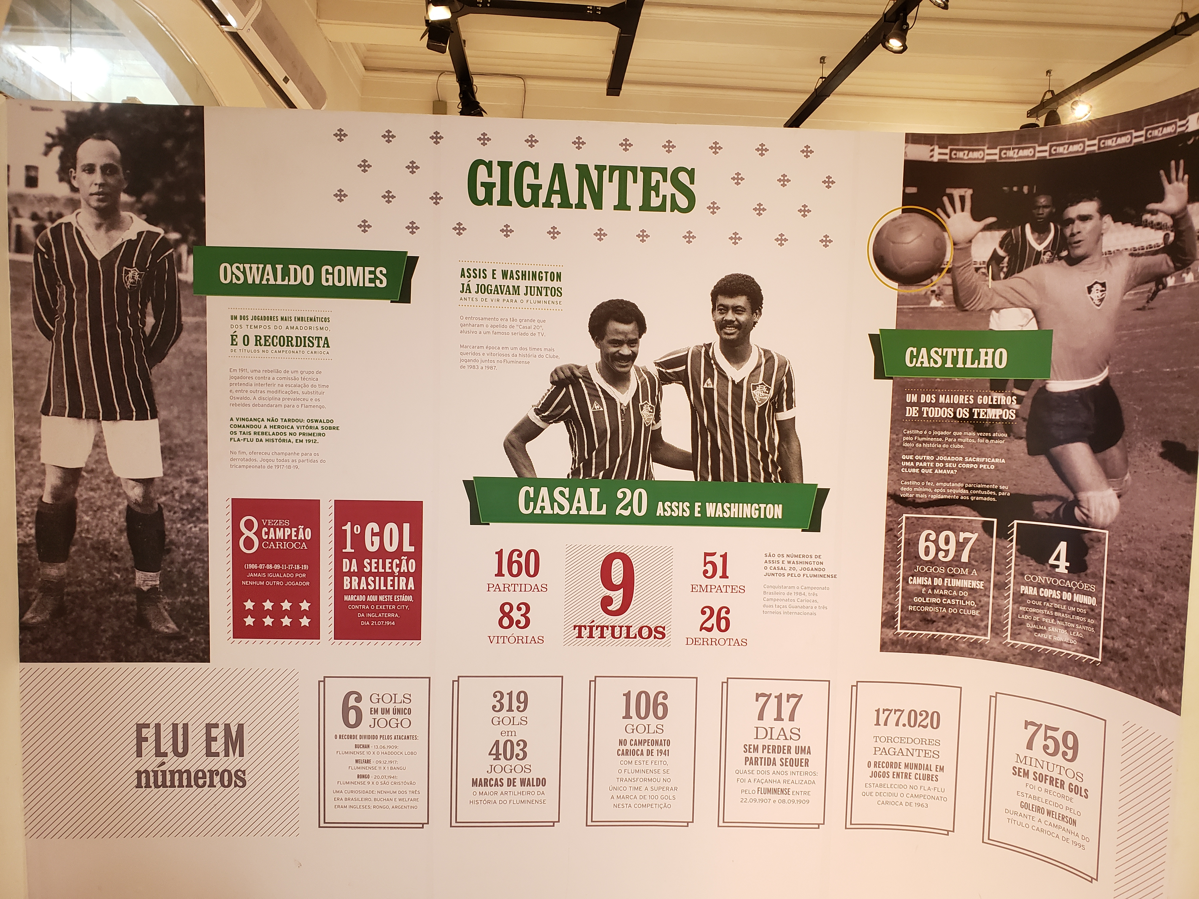 Ídolos homenageados pelo Fluminense na Sala de Troféus do clube.